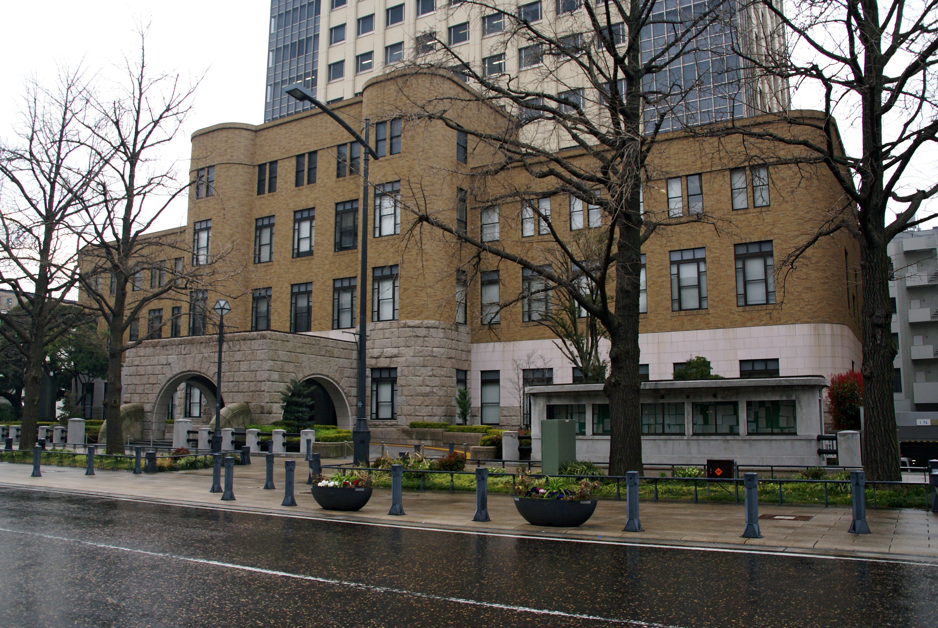 Yokohama-District-Court in Yokohama, Kanagawa, Japan